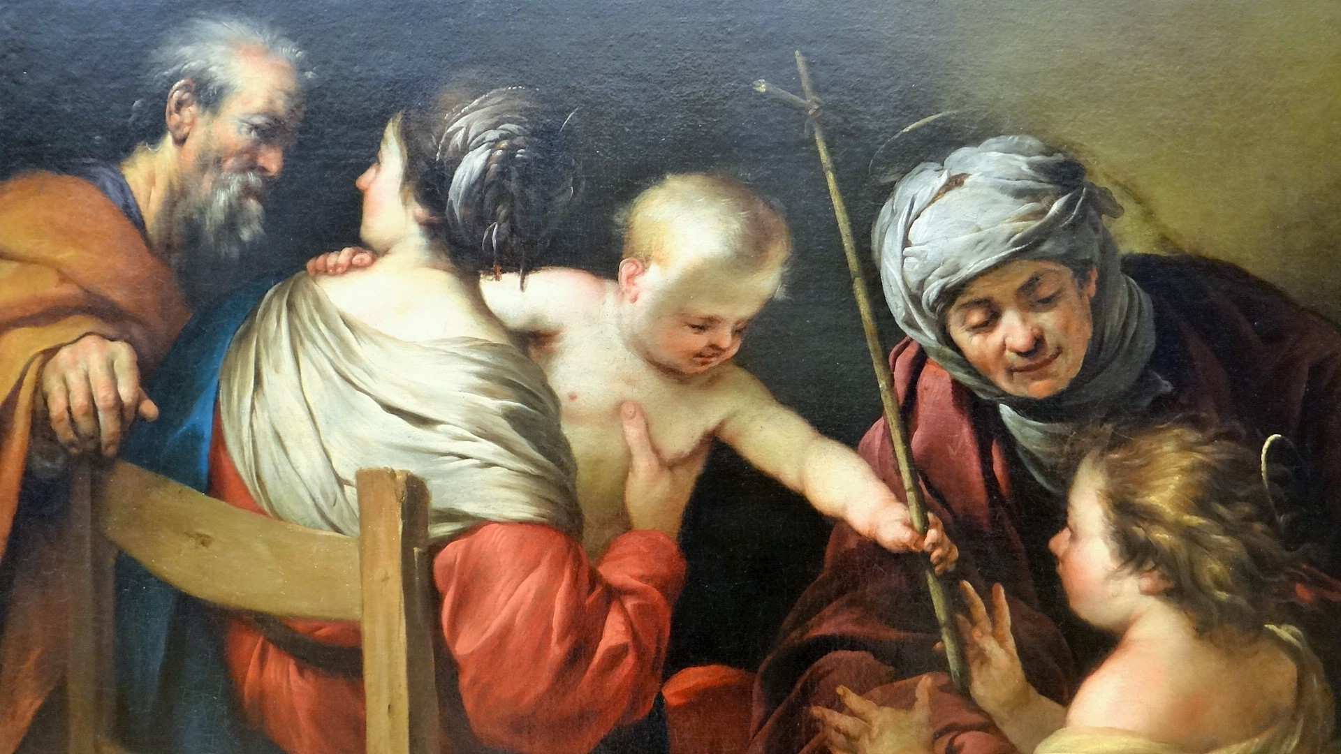 La Sainte Famille avec sainte Elisabteh et le petit saint Jean Baptiste à qui l'Enfant Jésus donne une croix en roseau, huiel sur toile vers 1630, Jacques Blanchard (1600-1638)